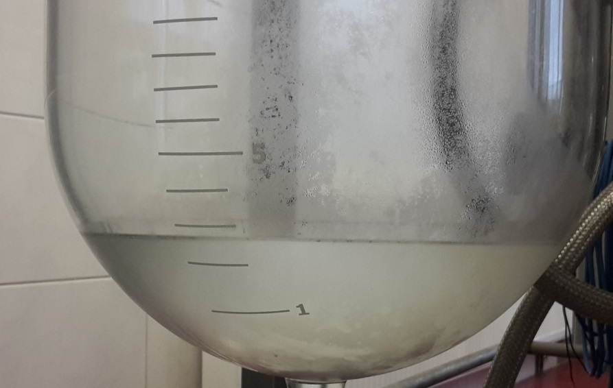 Auskondensiertes Lösemittel. Die Produkteigenschaften bleiben im Zuge der Vakuumtrocknung erhalten.